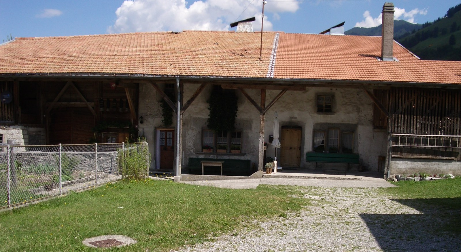 Grandvillard, Switzerland self-made, August 2005